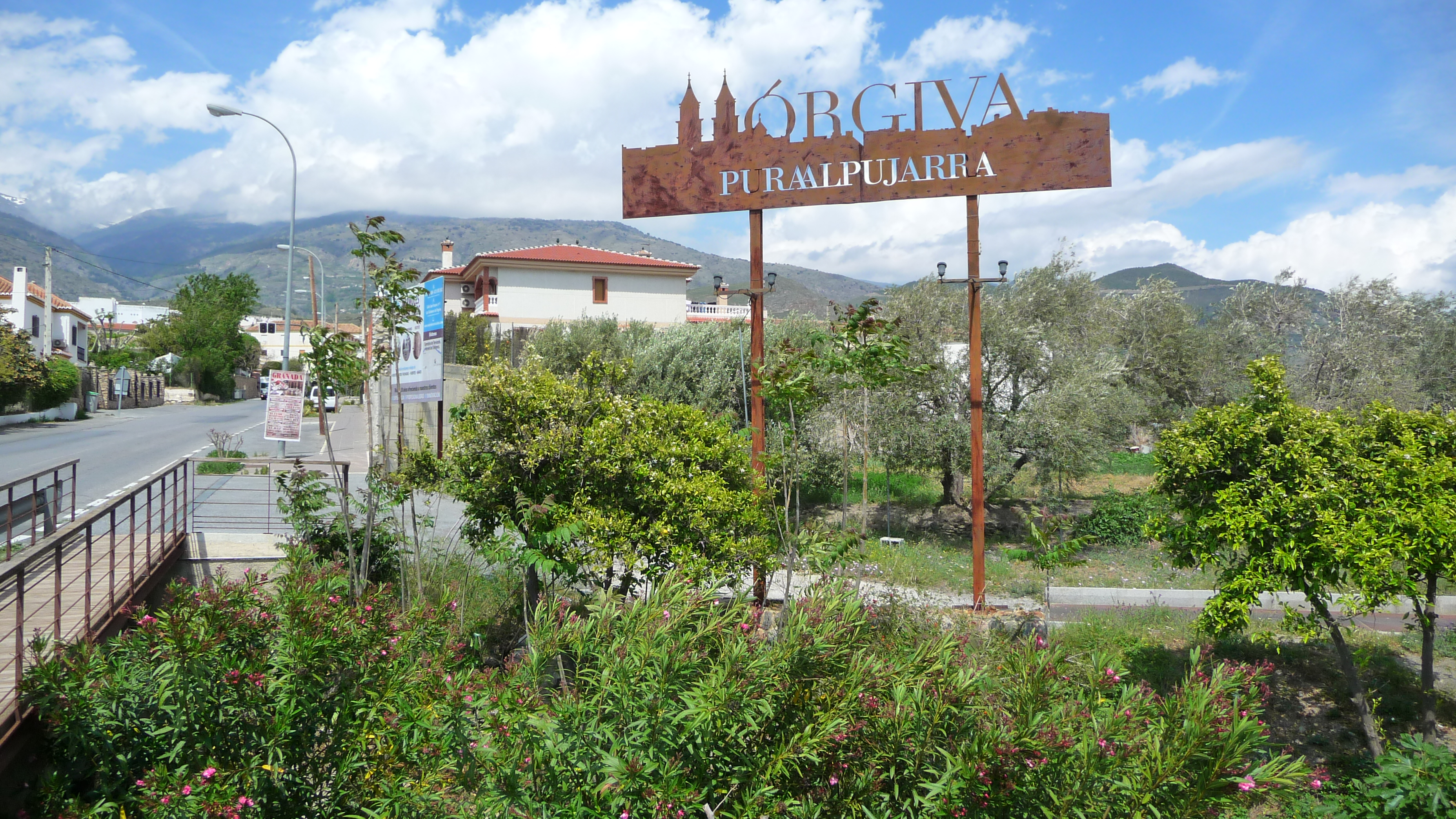 Órgiva